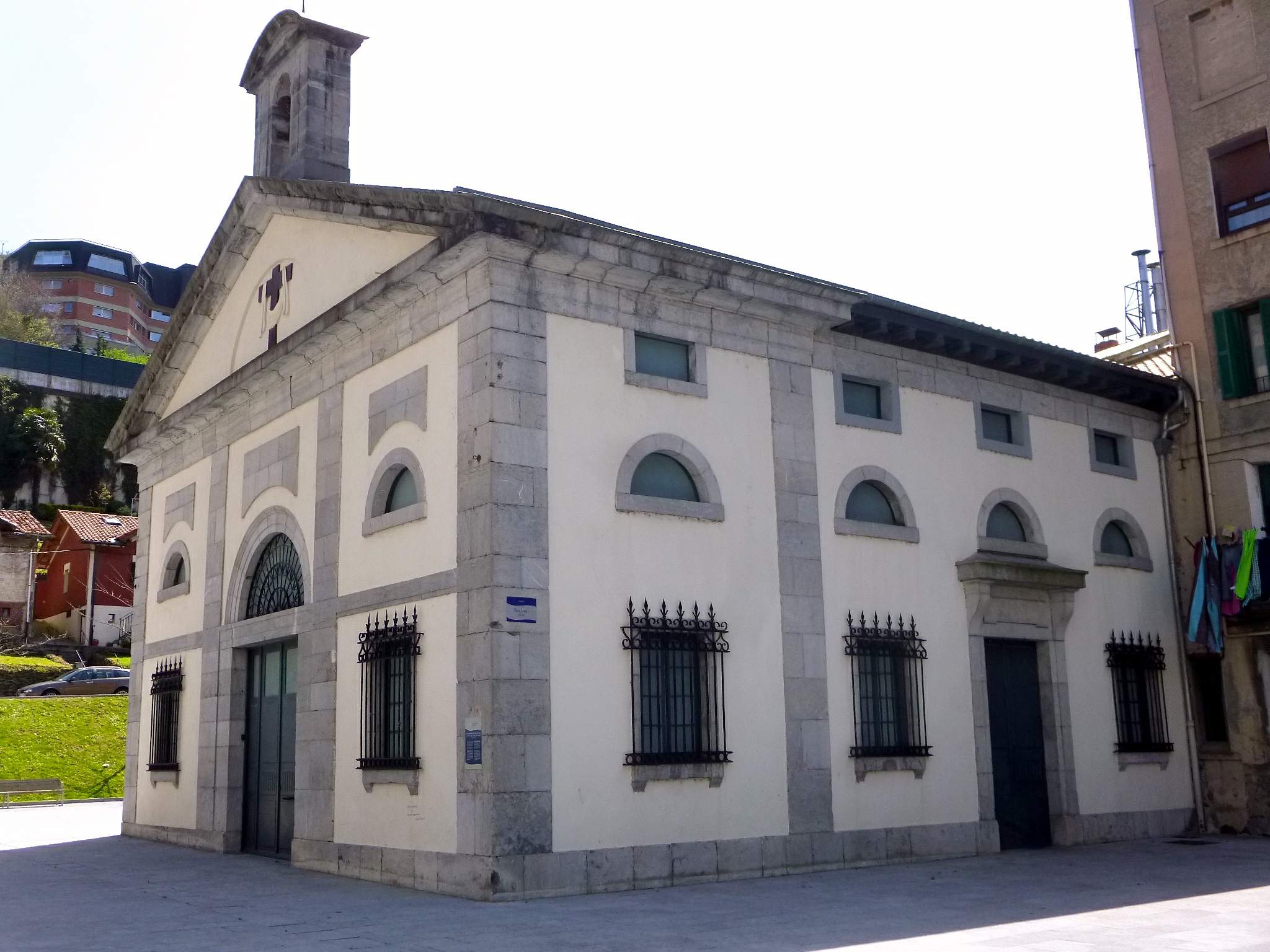 Capilla de San Juan de Arramele (Tolosa)